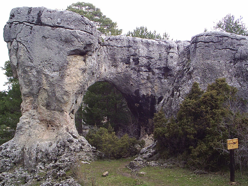 Otra foto del paraje de Los Callejones de Las Majadas